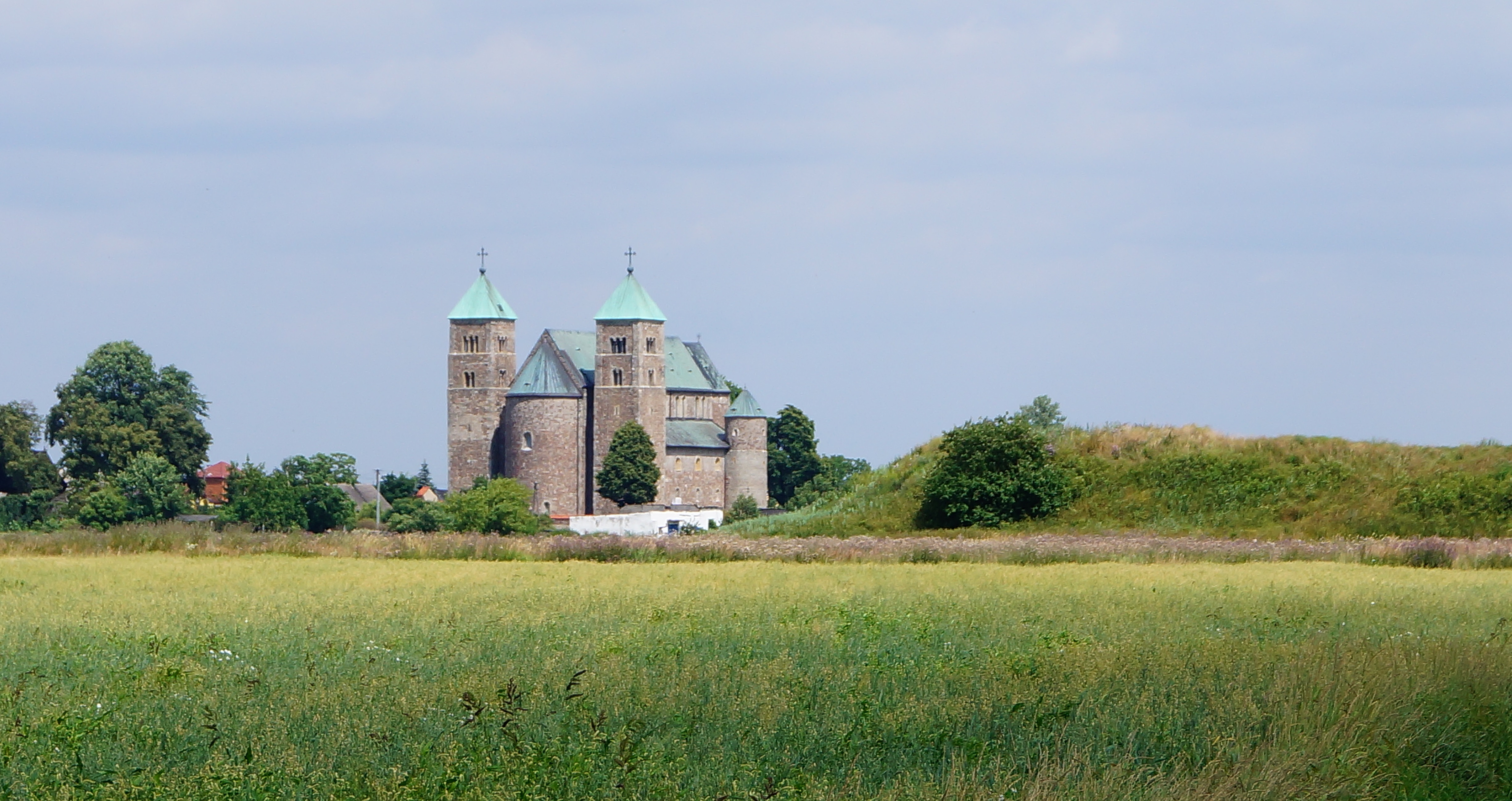 Klasztor w Tumie k. Łęczycy, widok z okolicznych pól. Po prawej widoczny wał grodziska.